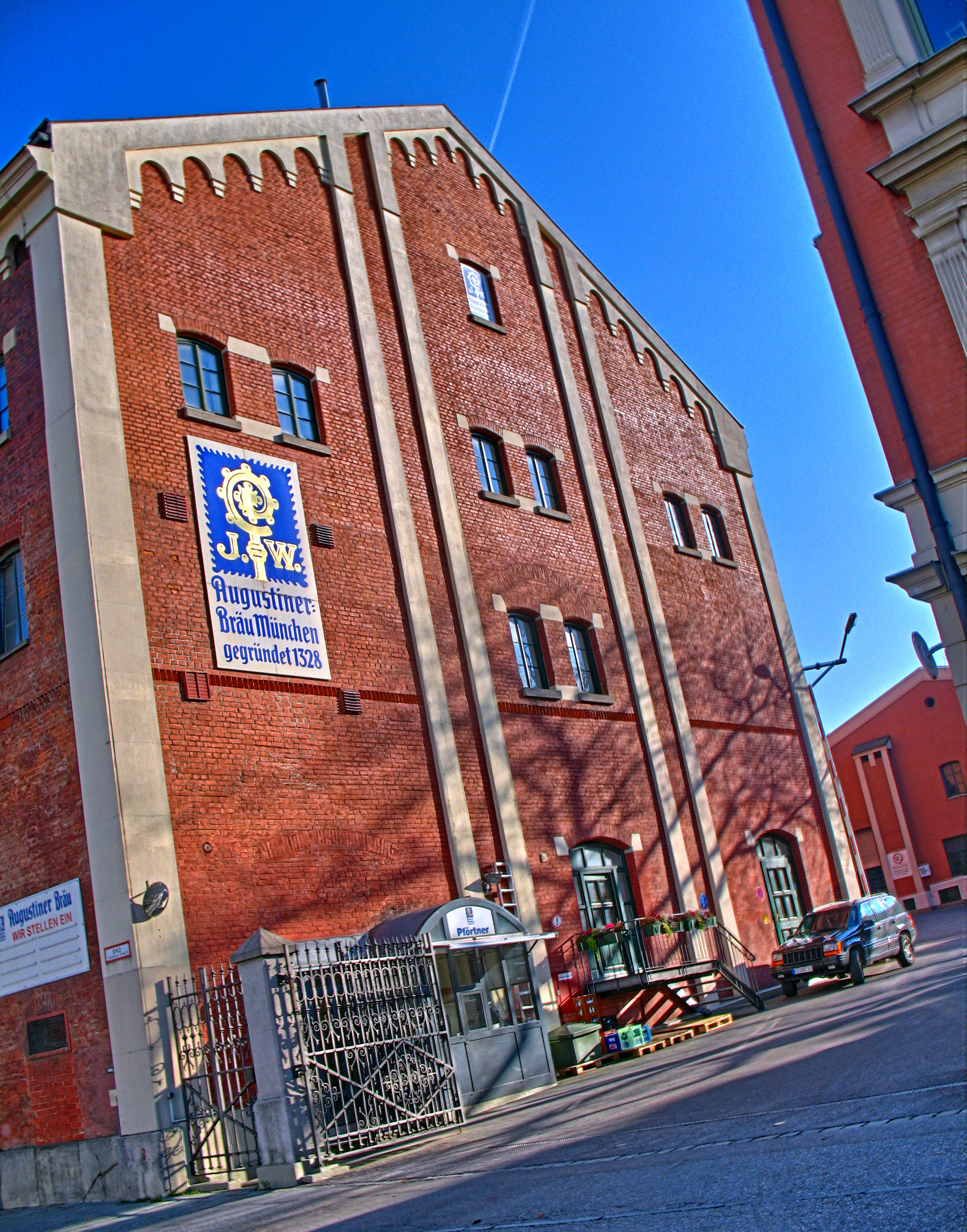 Germany, Bavaria, Munich, Augustiner-Bräu, Werkseinfahrt